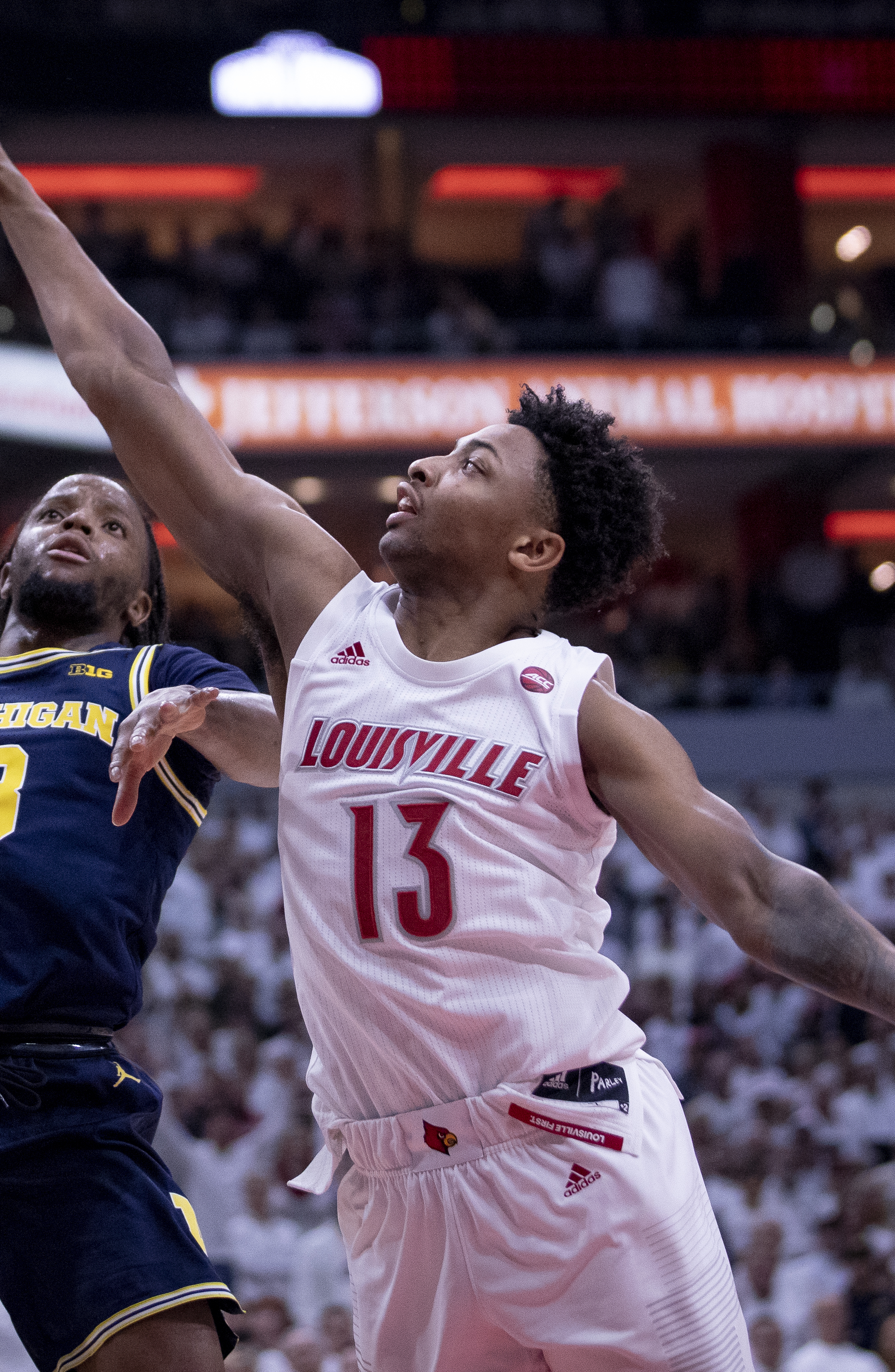 _O6A1983